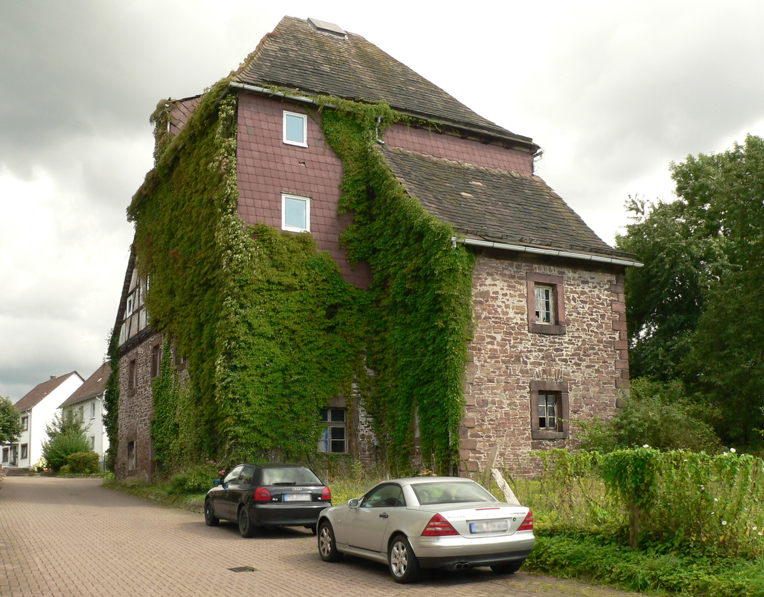 Die Alte Mühle oder Windmühle, früheres Gebäude der Porzellanmanufaktur Fürstenberg